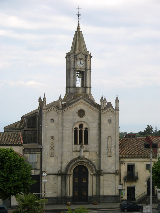 Chiesa "S. Giuseppe" - Pisano Etneo (CT) - Foto D. Pennisi